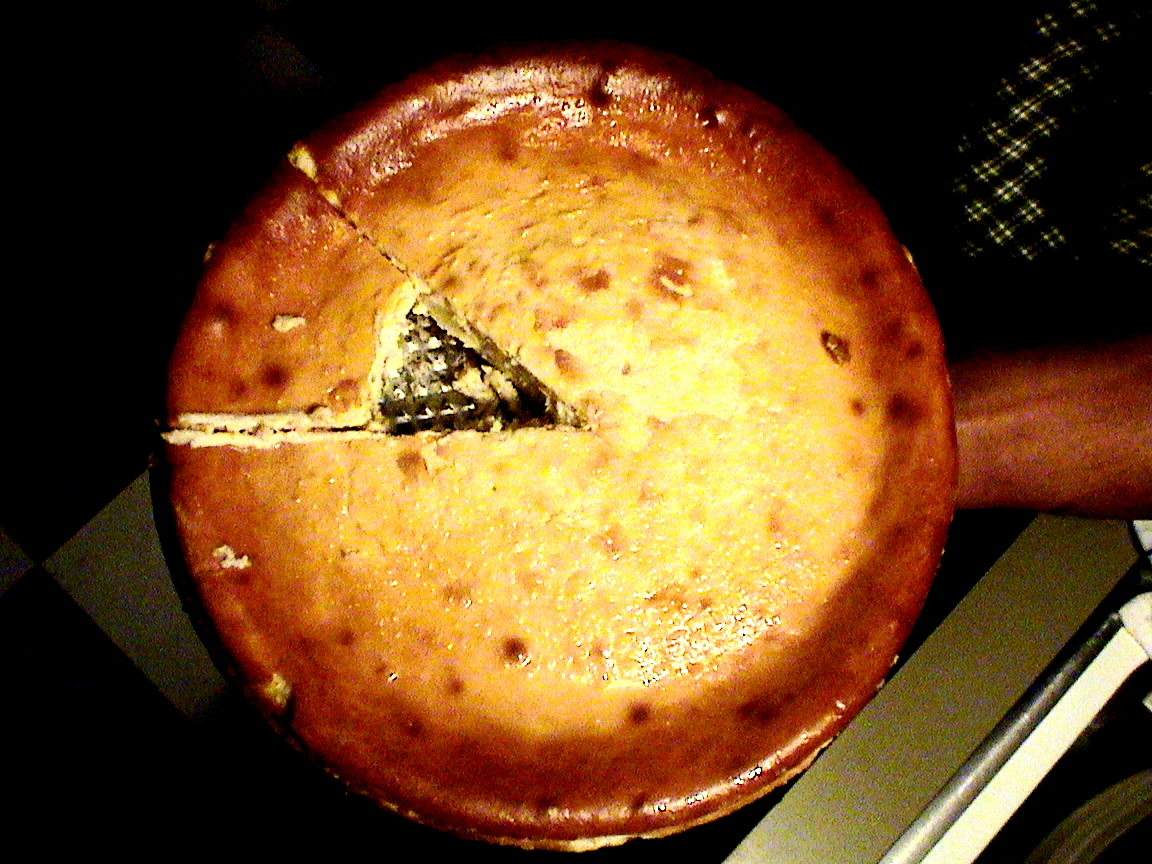 Cheesecake